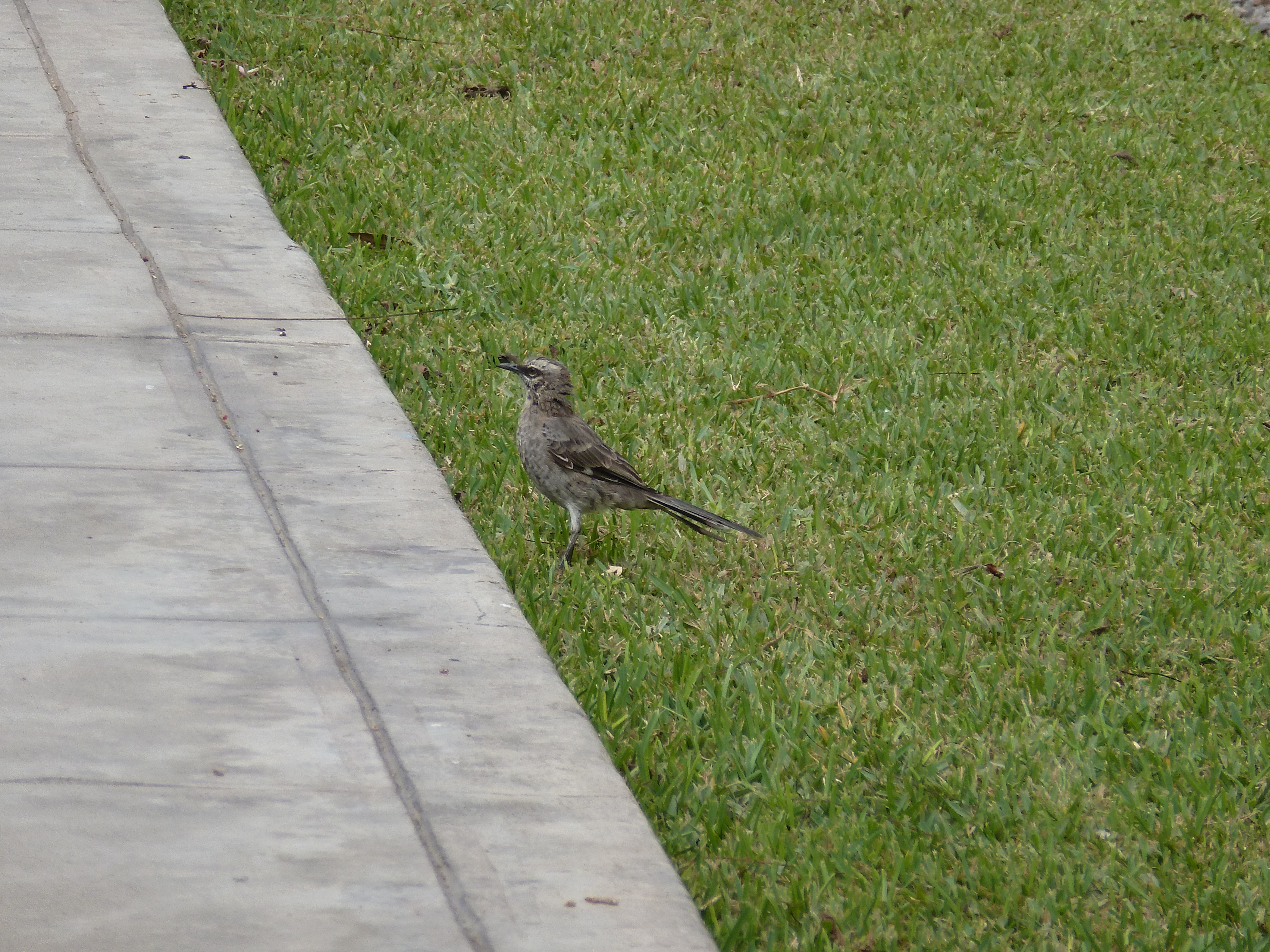 Mimus Longicaudutus en el "Parque de Zela", ubicado en el distrito de Miraflores, Lima, Perú.